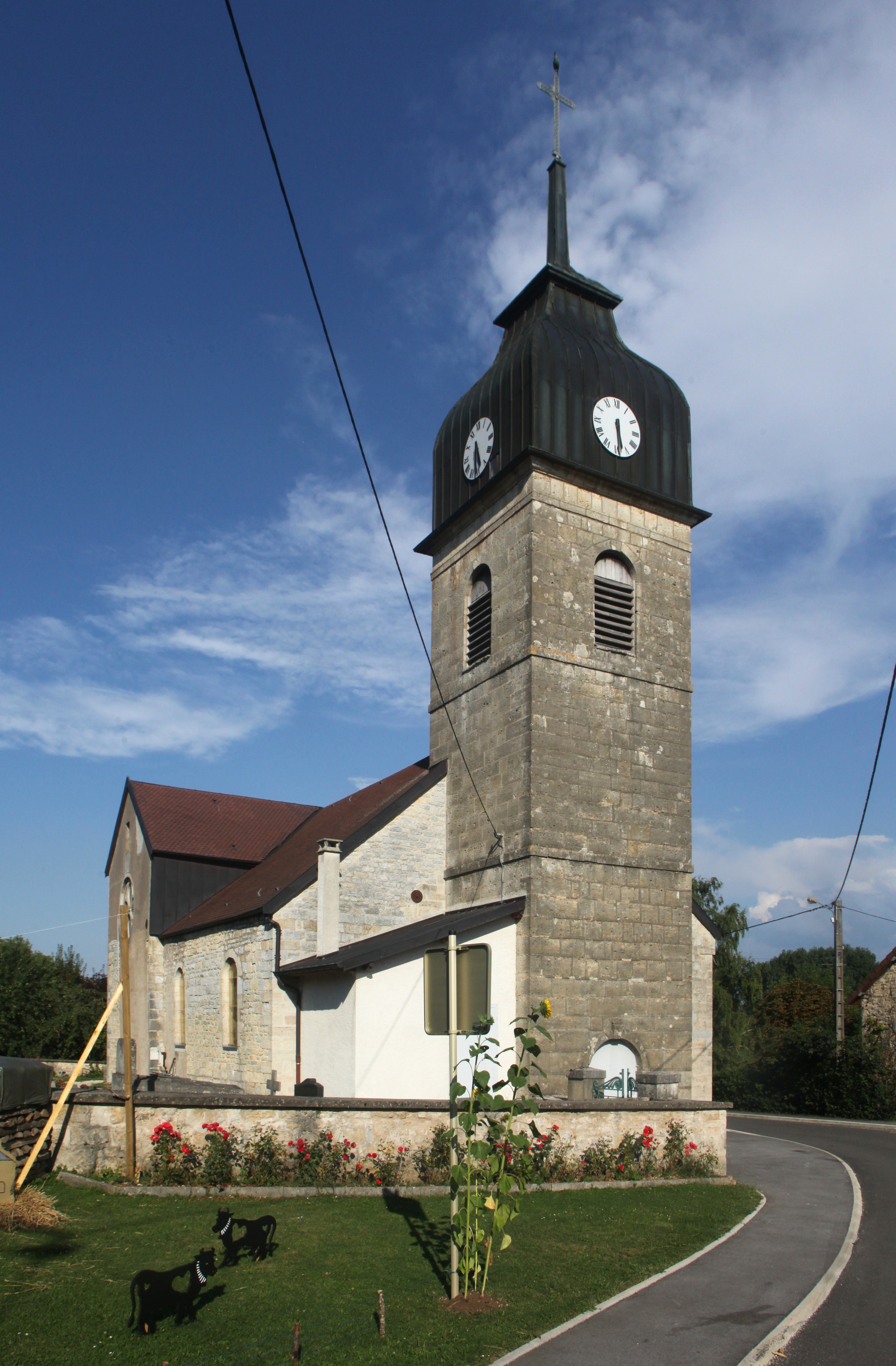 Église de Guyans-Durnes (Doubs).